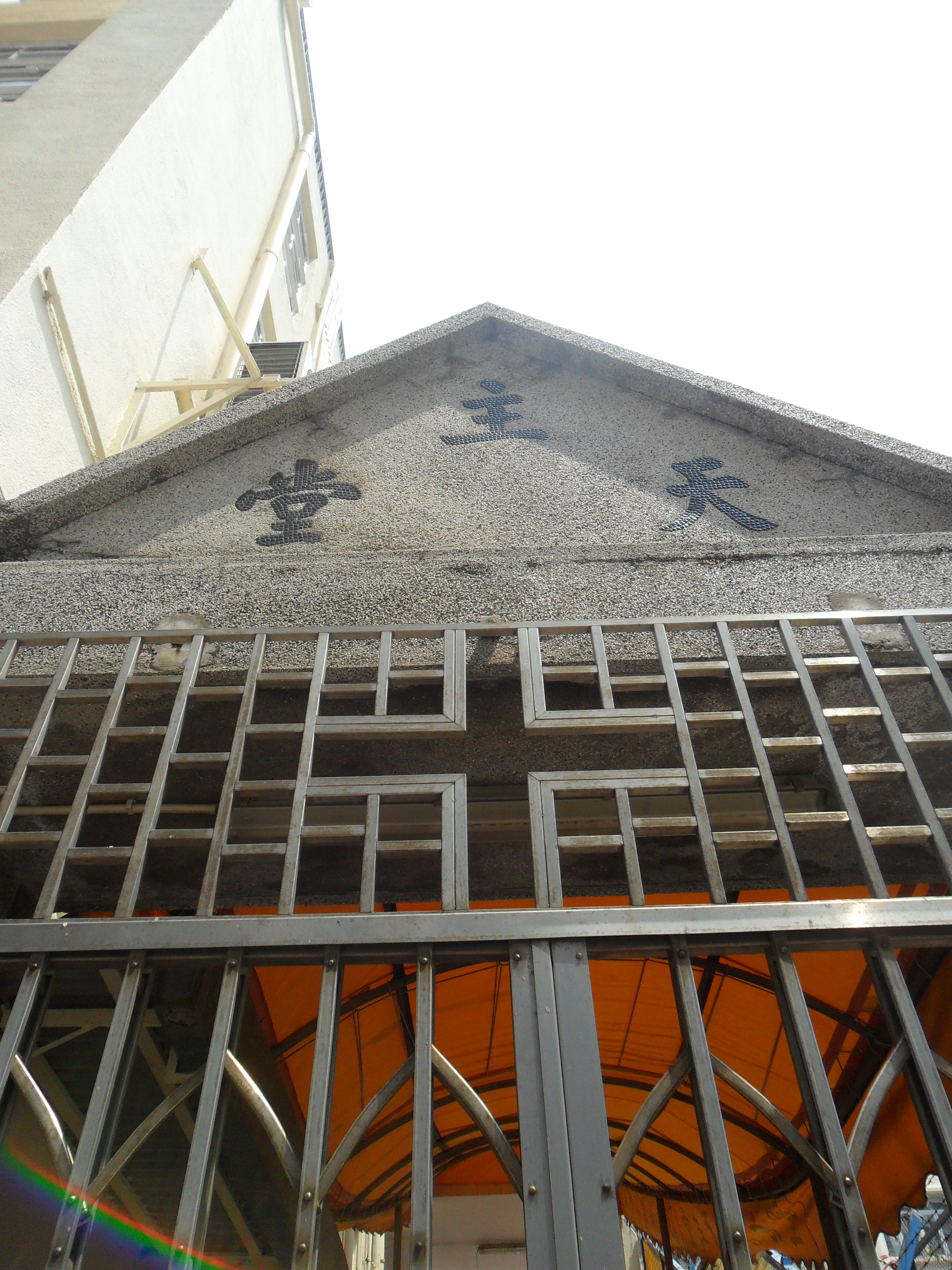 中文（香港）: 聖老楞佐堂, 香港, 中國